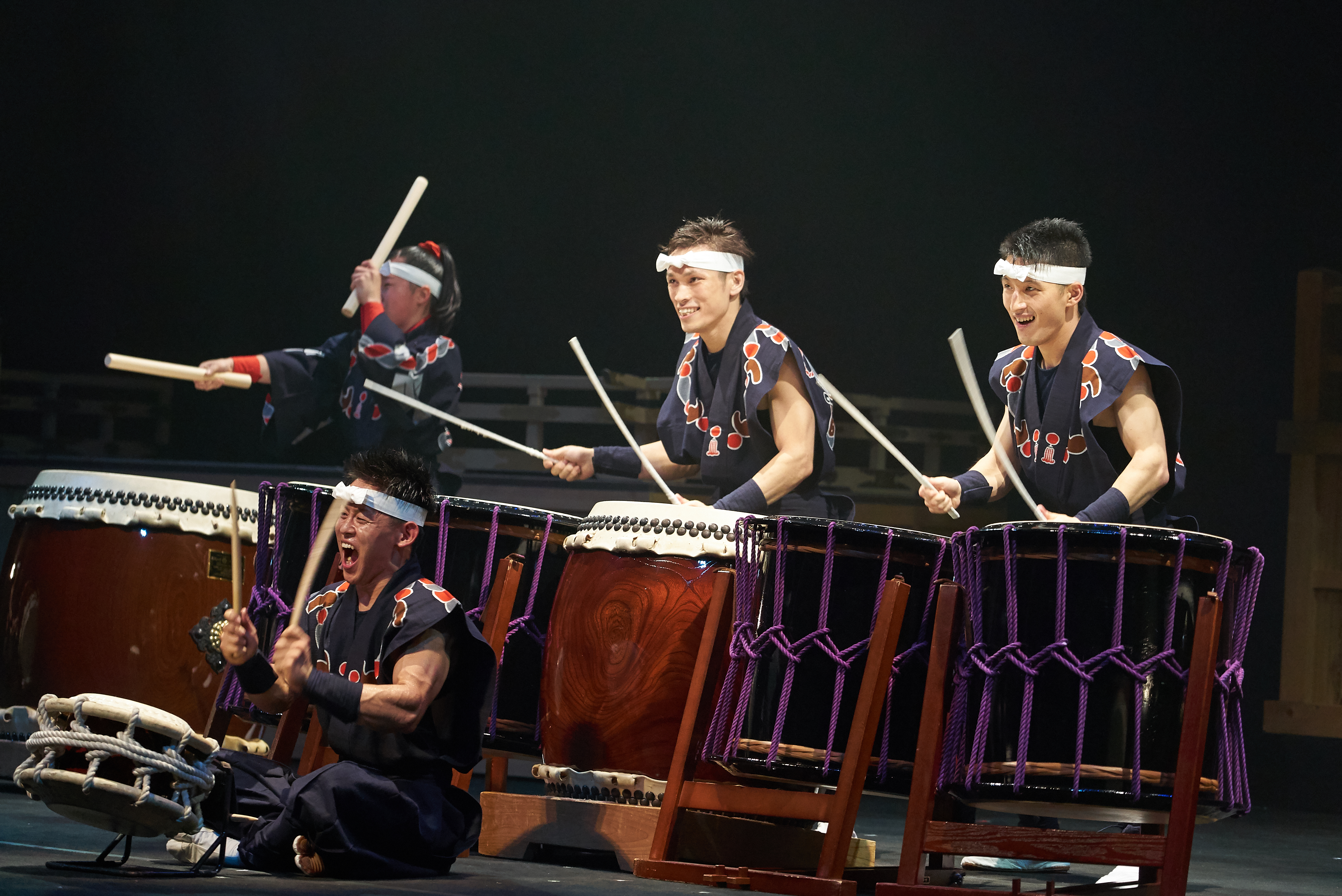 煮渕 志多らの公演にて